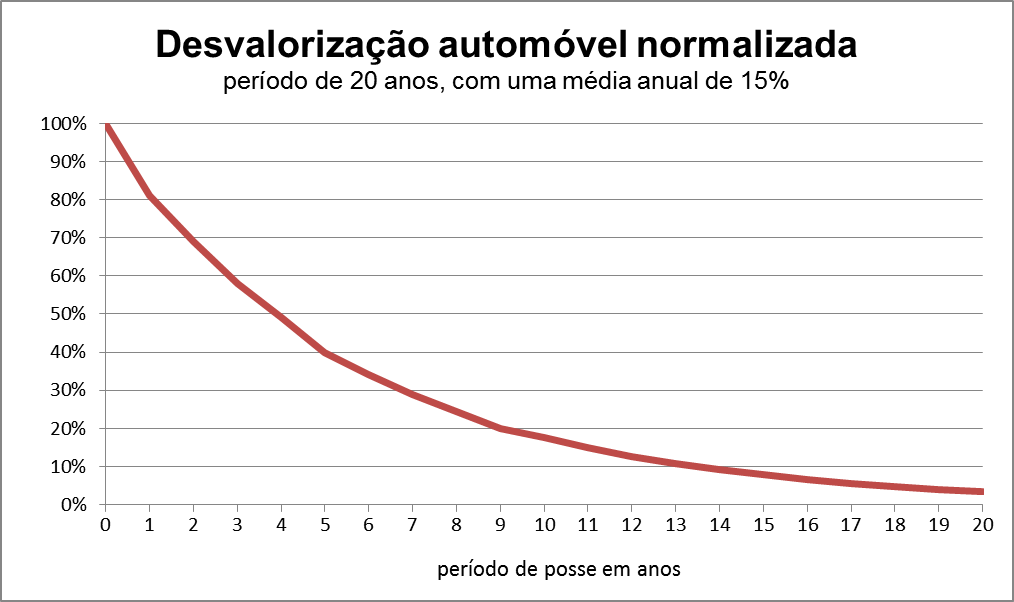 Desvalorização automóvel num período de 20 anos; média anual de 15%.